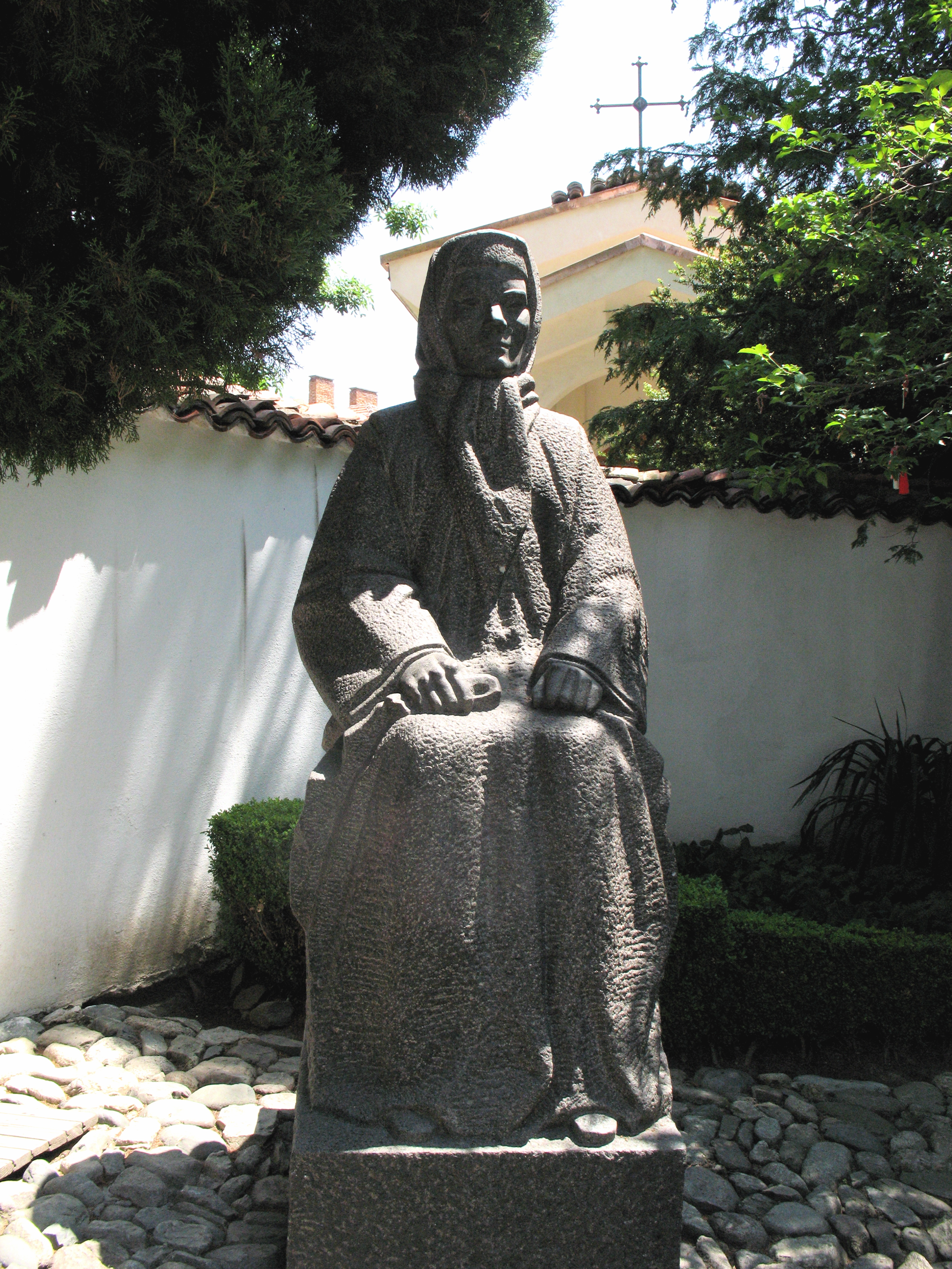 „Гина Кунчева — майката на Апостола на свободата Васил Левски“